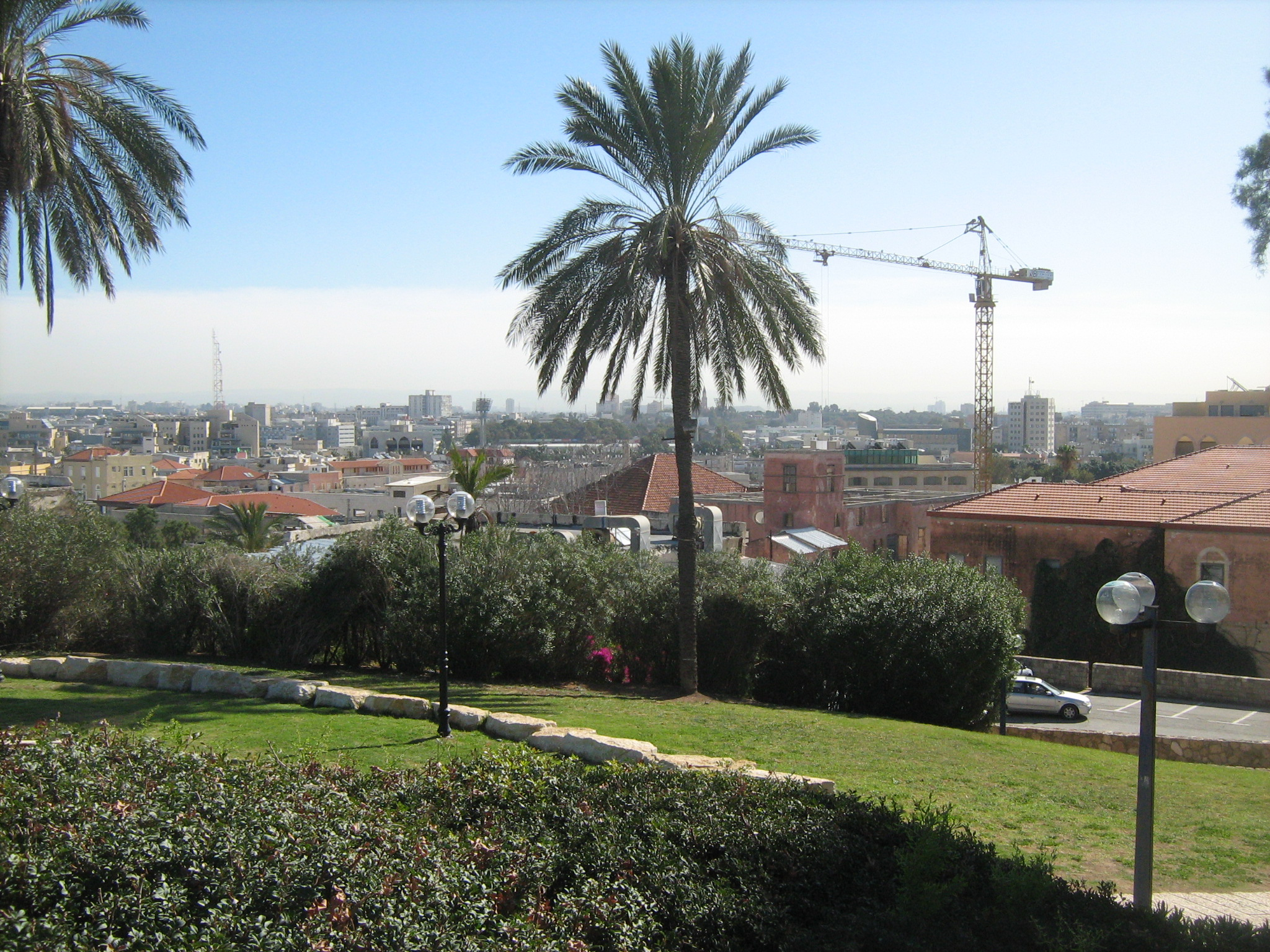 גן הפסגה ביפו